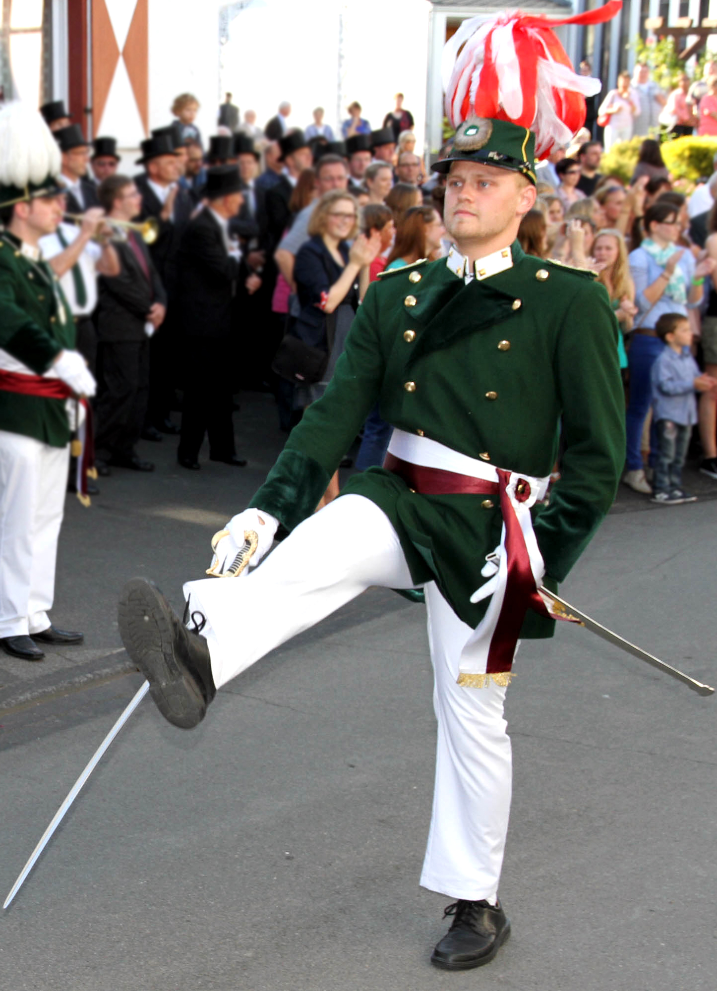 1. Offizier der Junggesellen-Schützen-Gesellschaft Lantershofen an Kirmes 2012 in Uniform bei der Parade